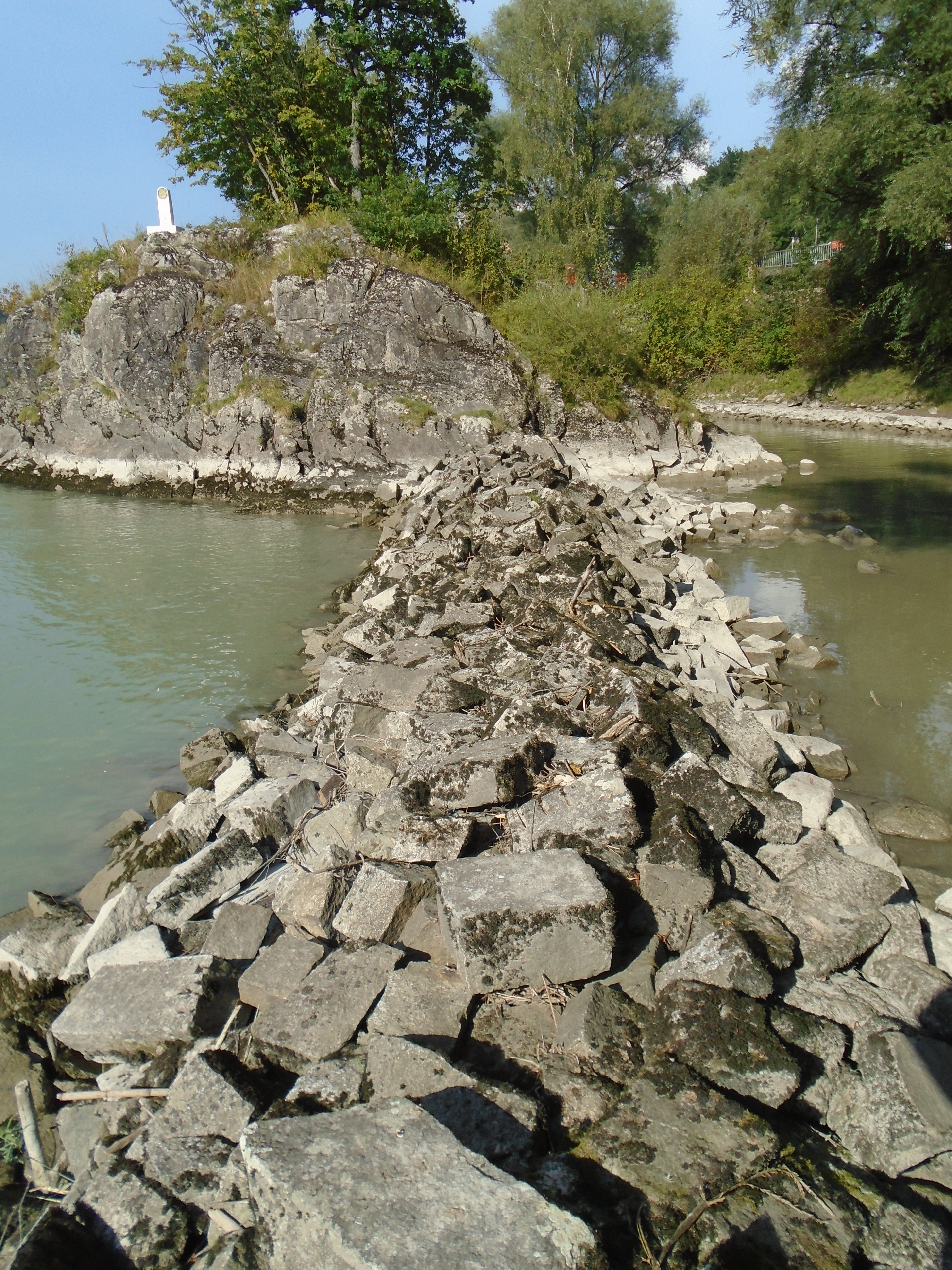 Kräutelstein, Donauinsel unterhalb von Passau, vom Beginn des Leitdamms aus Richtung Insel